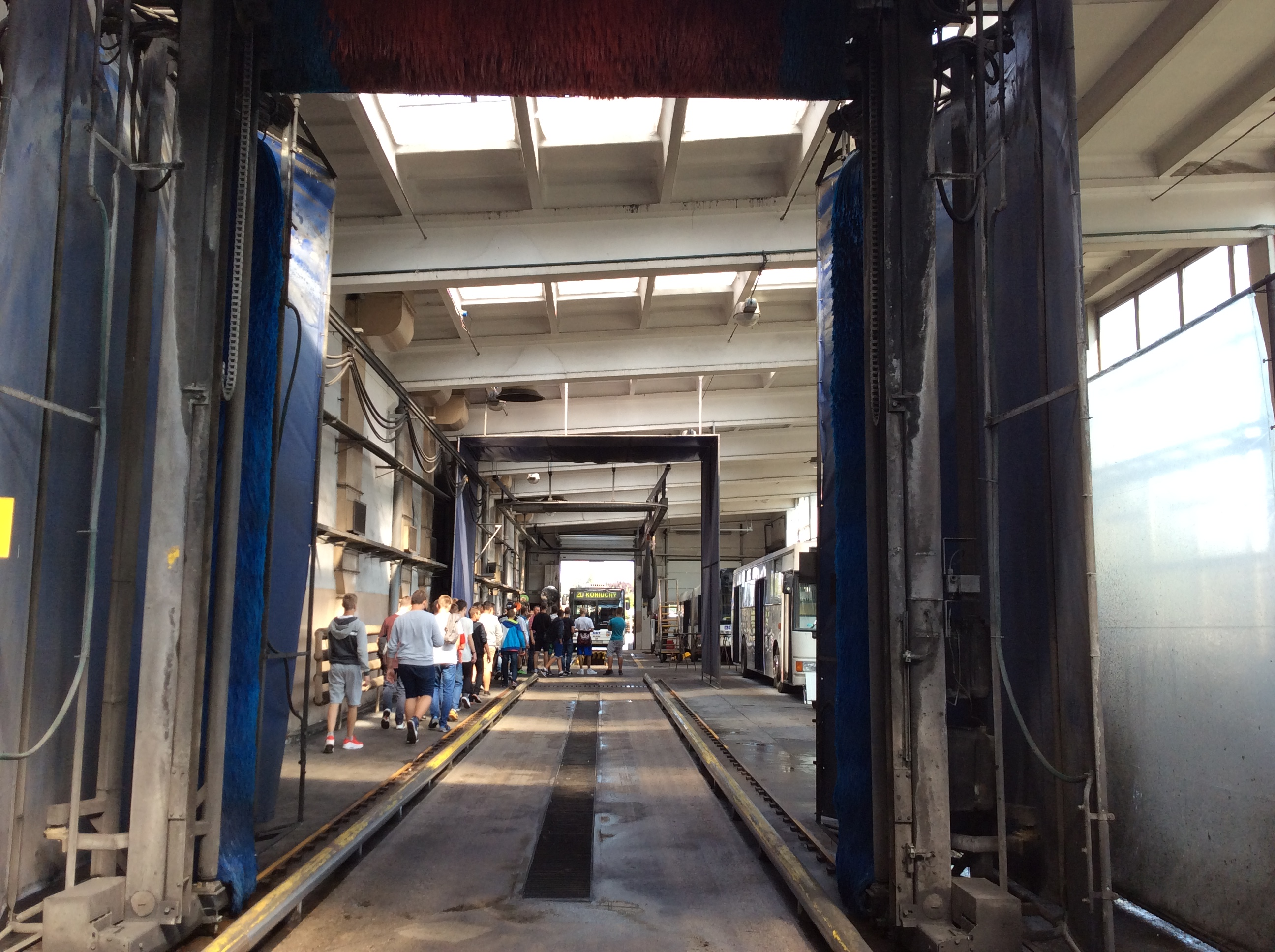 Zajezdnia autobusowa w Toruniu6